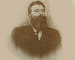 Fundador do município de Conquista, Minas Gerais, Brasil.